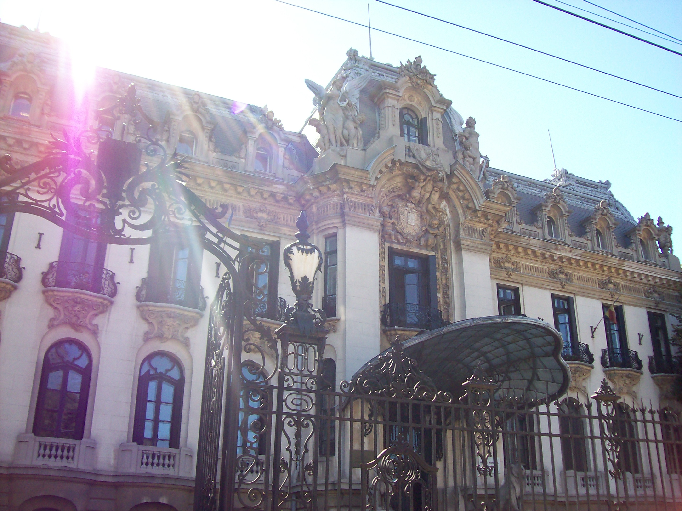 Het Cantacuzinopaleis in Boekarest. Palatul Cantacuzino, zomer 2006. Het in barokstijl opgetrokken Cantacuzino Paleis in Boekarest.